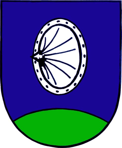 Znak obce Chanovice